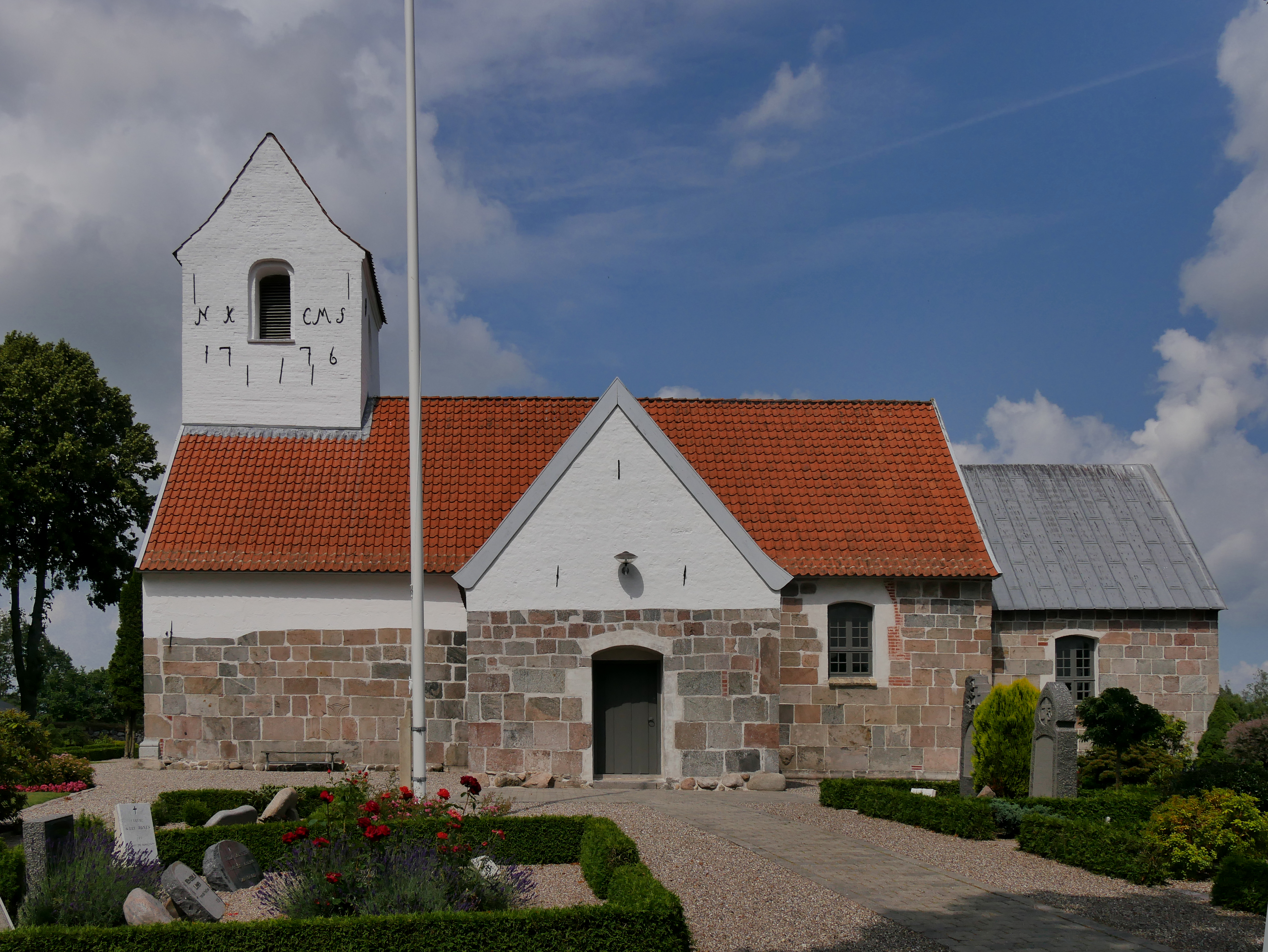 Oue Kirke von Süden